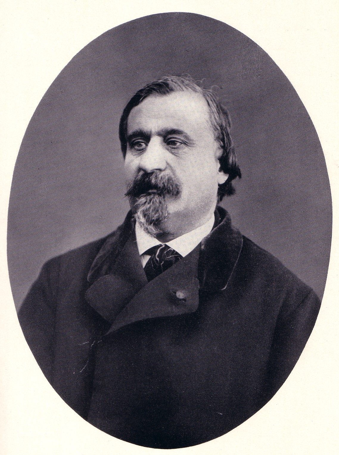 Giovanni Prati